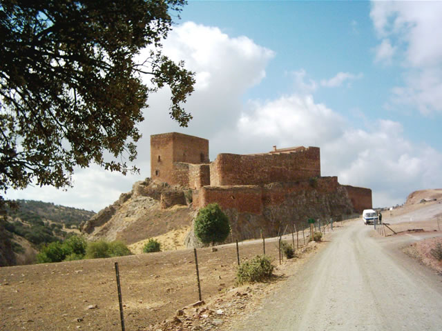 Castillo de Montizón de Torre de Juan Abad